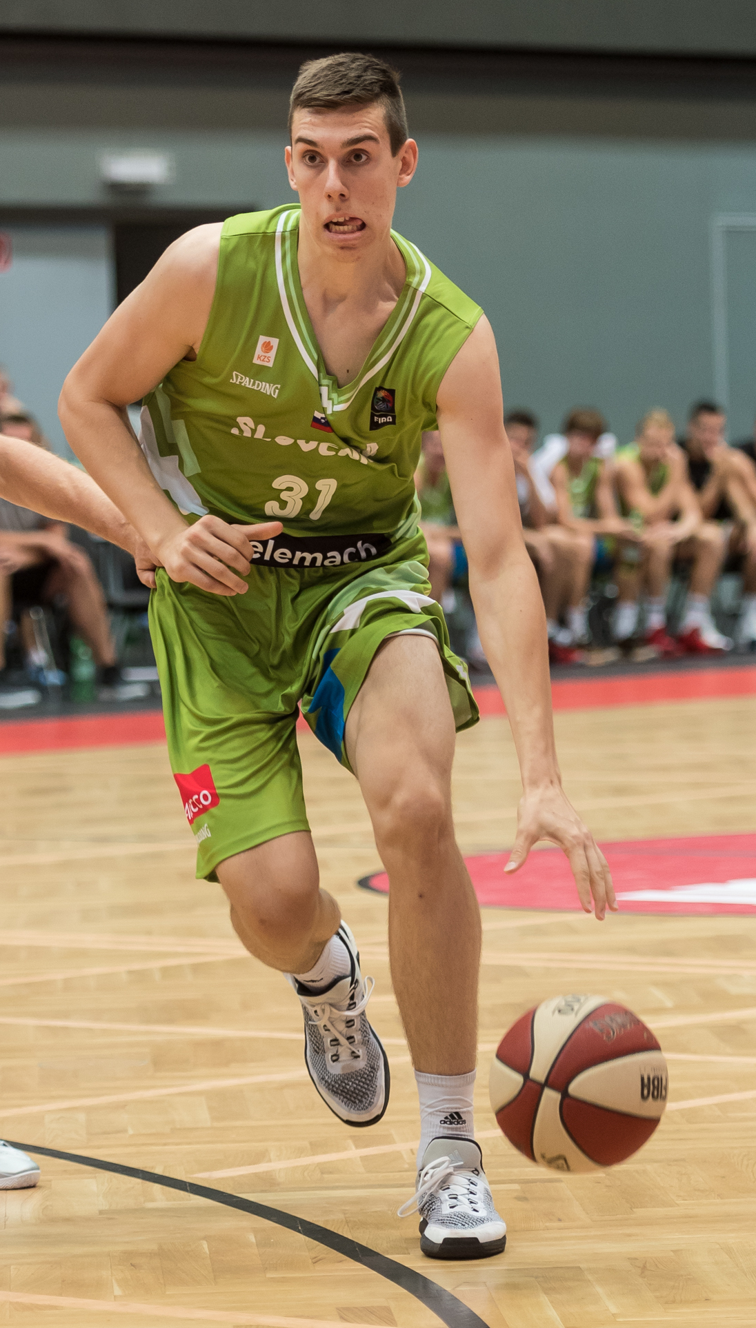 ÖBV Vier-Nationen-Turnier vom 12.-14. August 2016 in Schwechat - Island vs Slowenien. Bild zeigt Logi Gunnarsson (ISL) und Vlatko Cancar (SLO).